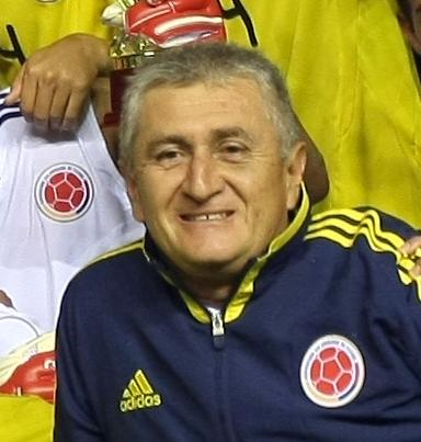 Coach Colobians of Football